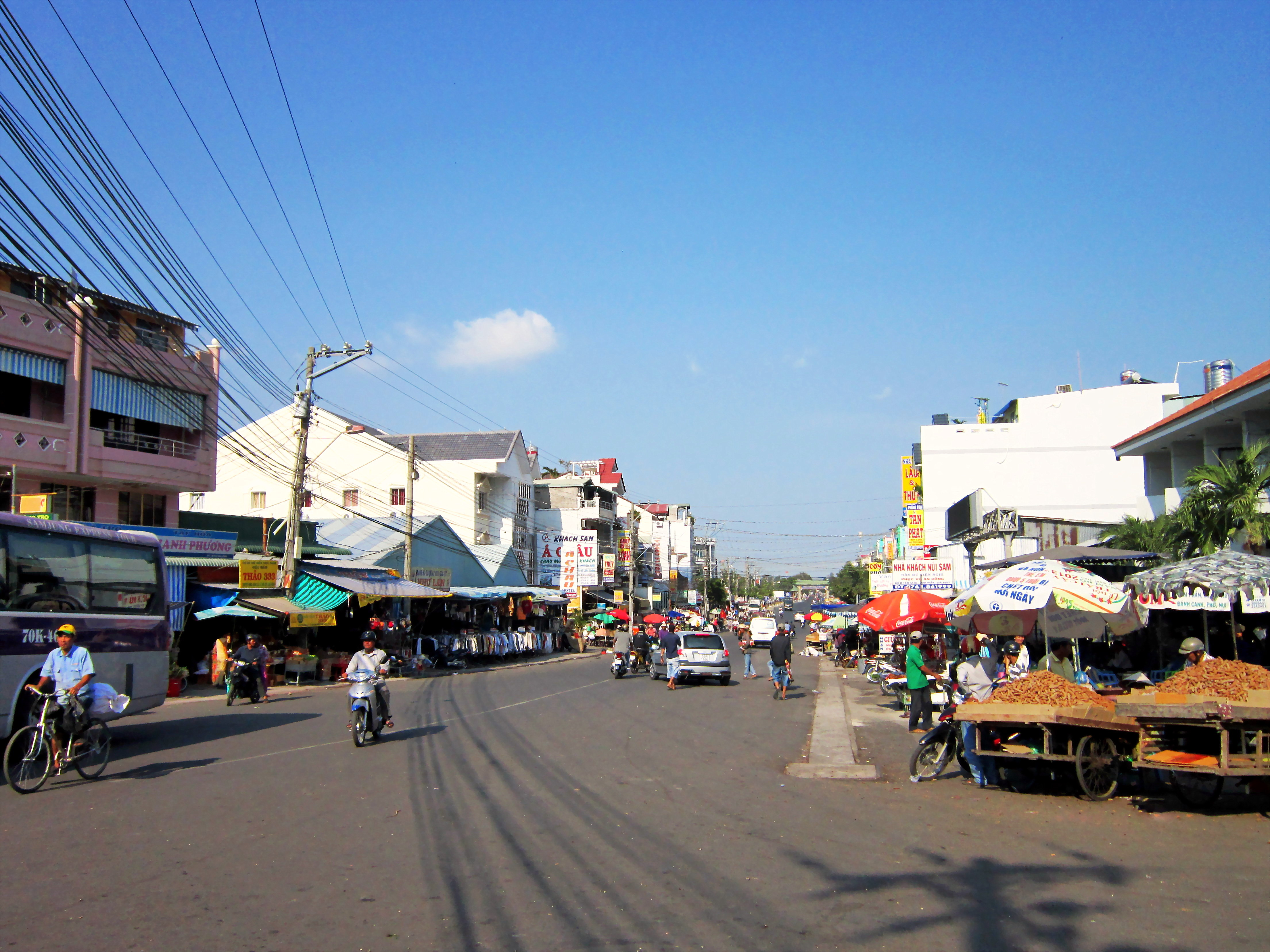 Một góc phố ở phường Núi Sam, thành phố Châu Đốc, tỉnh An Giang, Việt Nam.